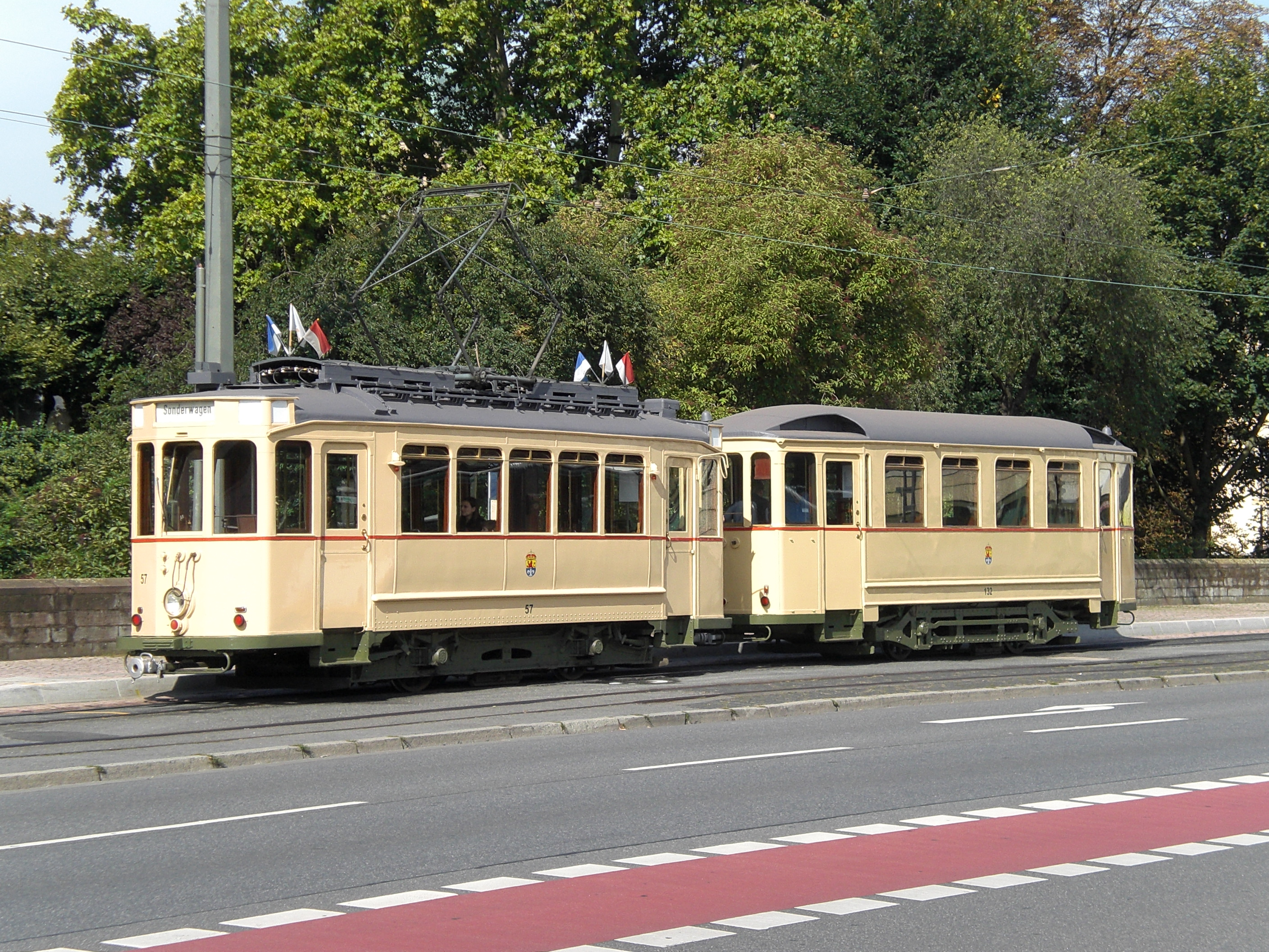 ST3 Tw.57 + SB3 Bw.132 in der Schlossschleife